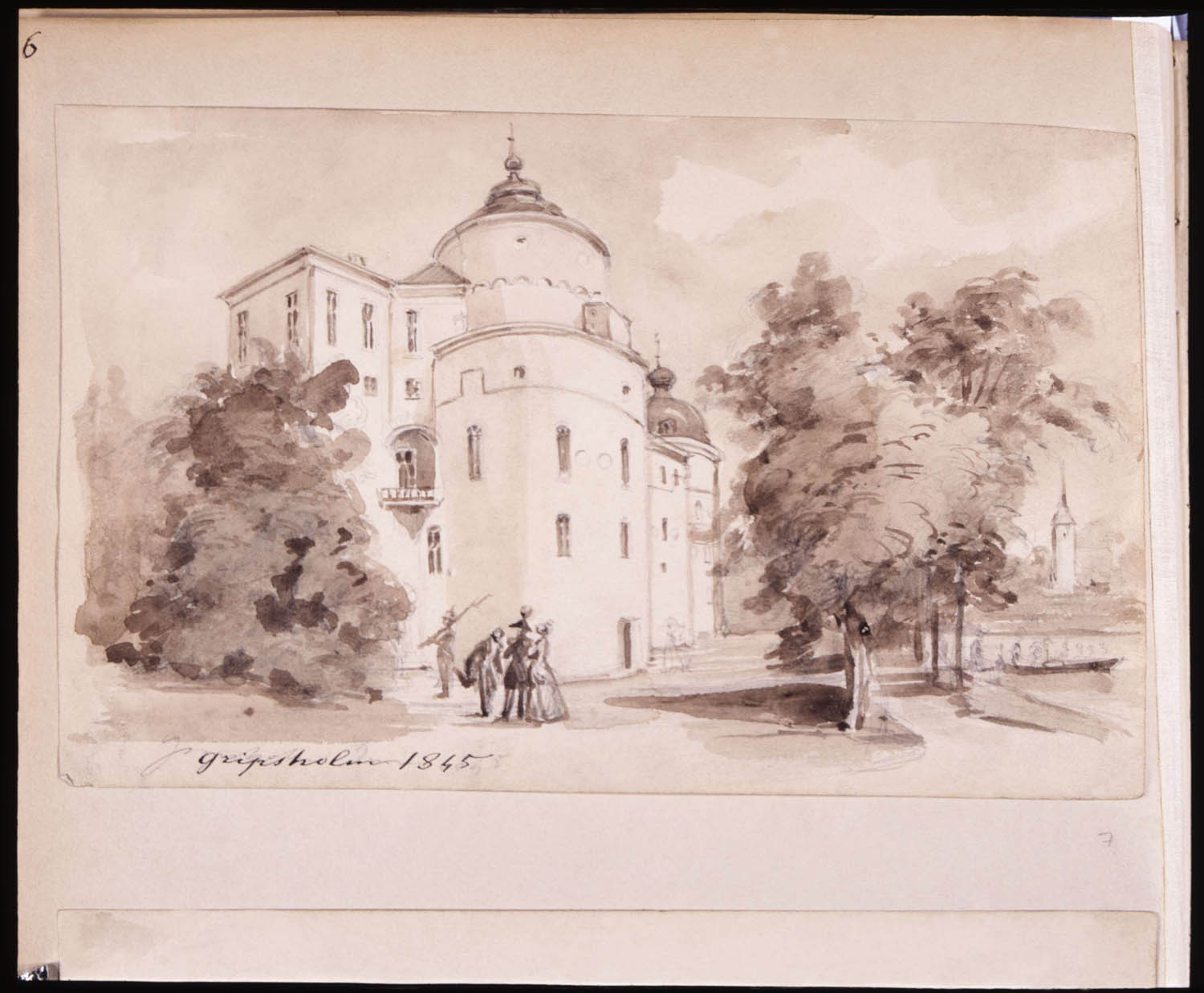 Depicted place: Södermanland, Selebo hd, Kärnbo, Gripsholms slott (Sverige (SE))